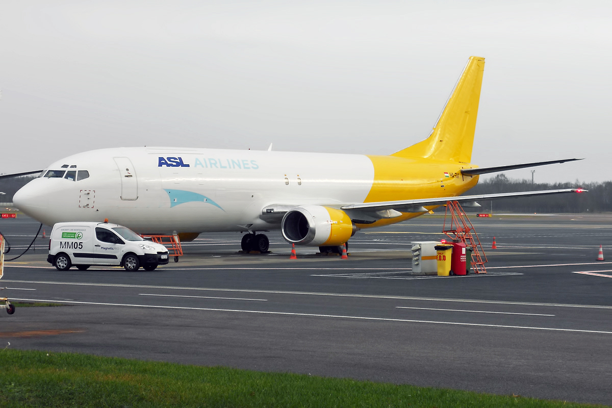 ASL Airlines, HA-FAX, Boeing 737-476 SF